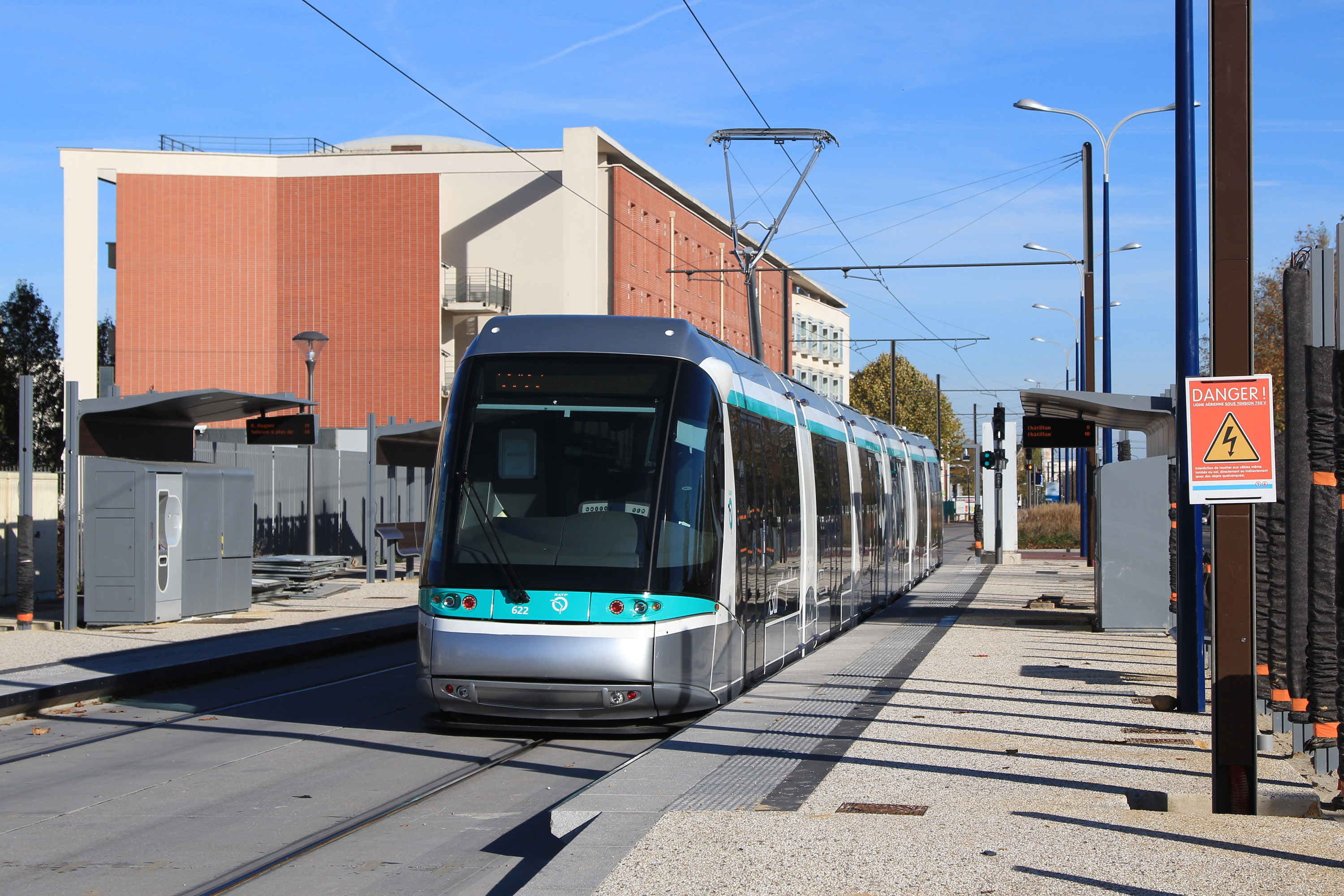 Un tramway en essais de la ligne 6 stationne à l'arrêt « Pavé blanc ».